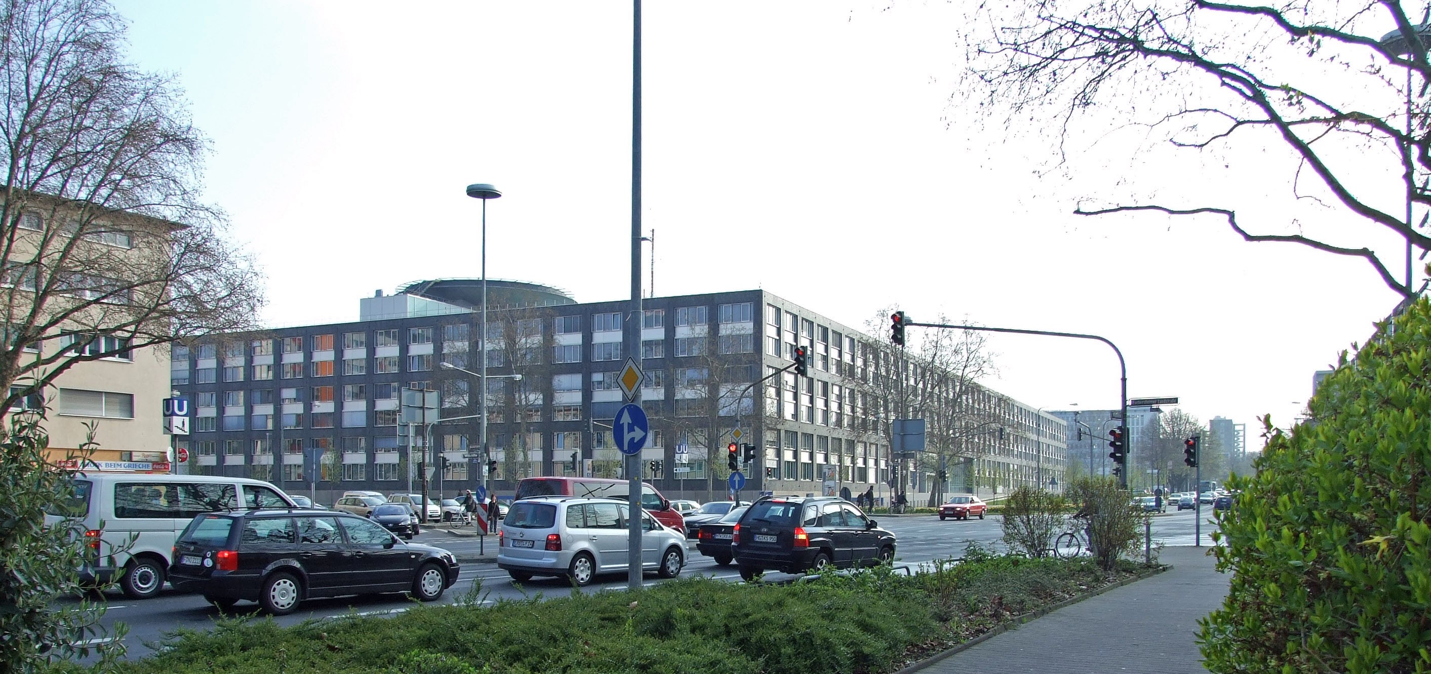 Polizeipraesidium in Frankfurt am Main, Ecke Eschersheimer Landstrasse/Adickesallee